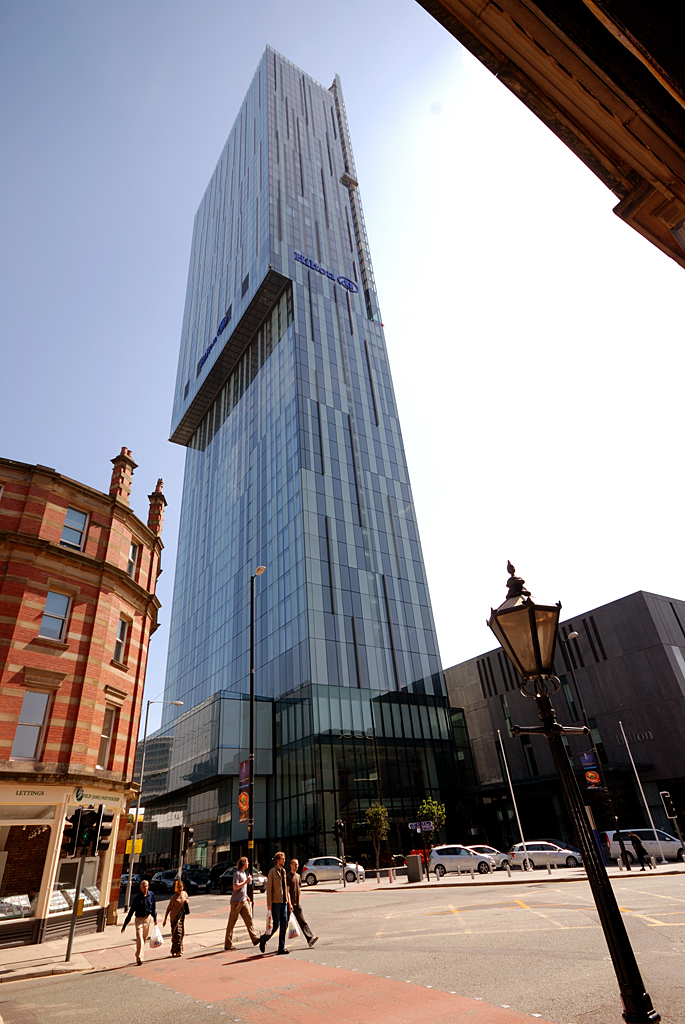 Manchester UK